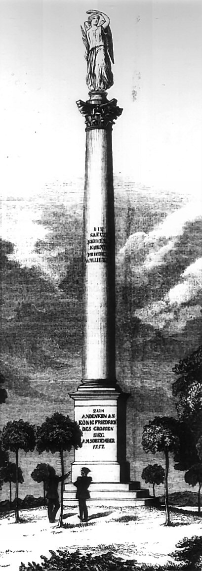 Heidau/Provinz Schlesien: Siegesdenkmal zur Erinnerung an die Schlacht des preußischen Heeres und den Sieg über die Österreicher bei Leuthen am 5. Dezember 1757